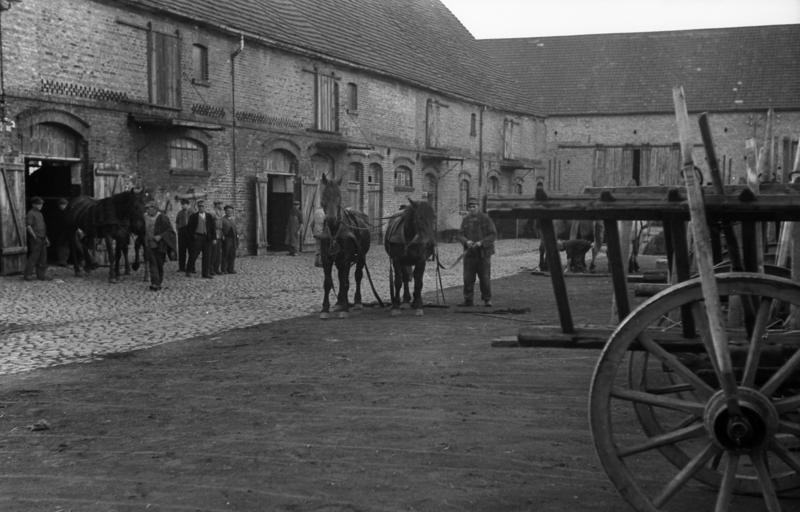 Markee, Arbeit auf dem Gutshof Illus-Heilig 27.7.48 Landesgut Markee bei Nauen. U.B.z.: Arbeitsbeginn auf dem Gutshof. Anspannen der Pferde. 1845-48